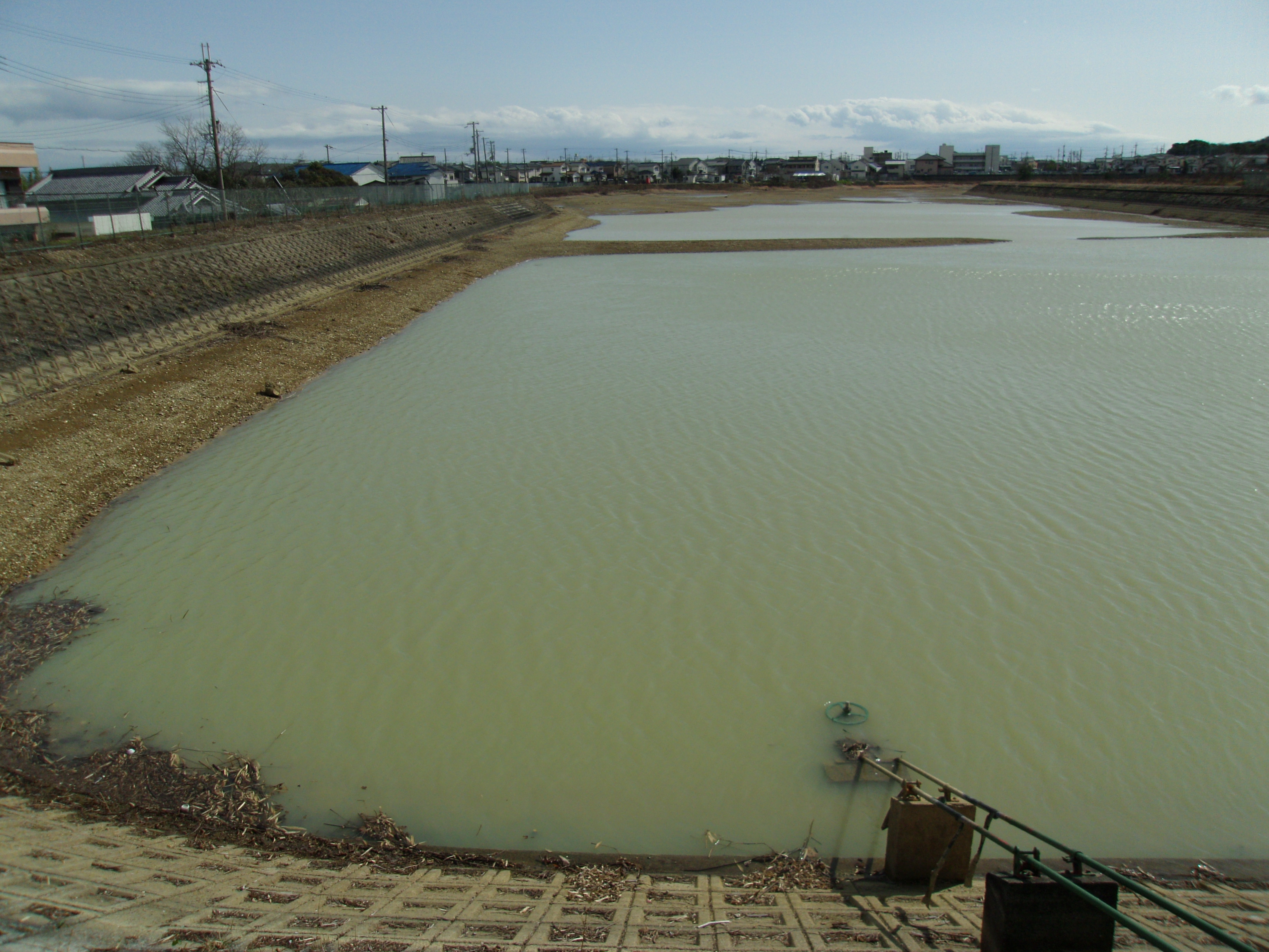 三木市総合防災公園内で暗渠となった淡河疎水が地表に現れる五百蔵池（三木市緑が丘町）